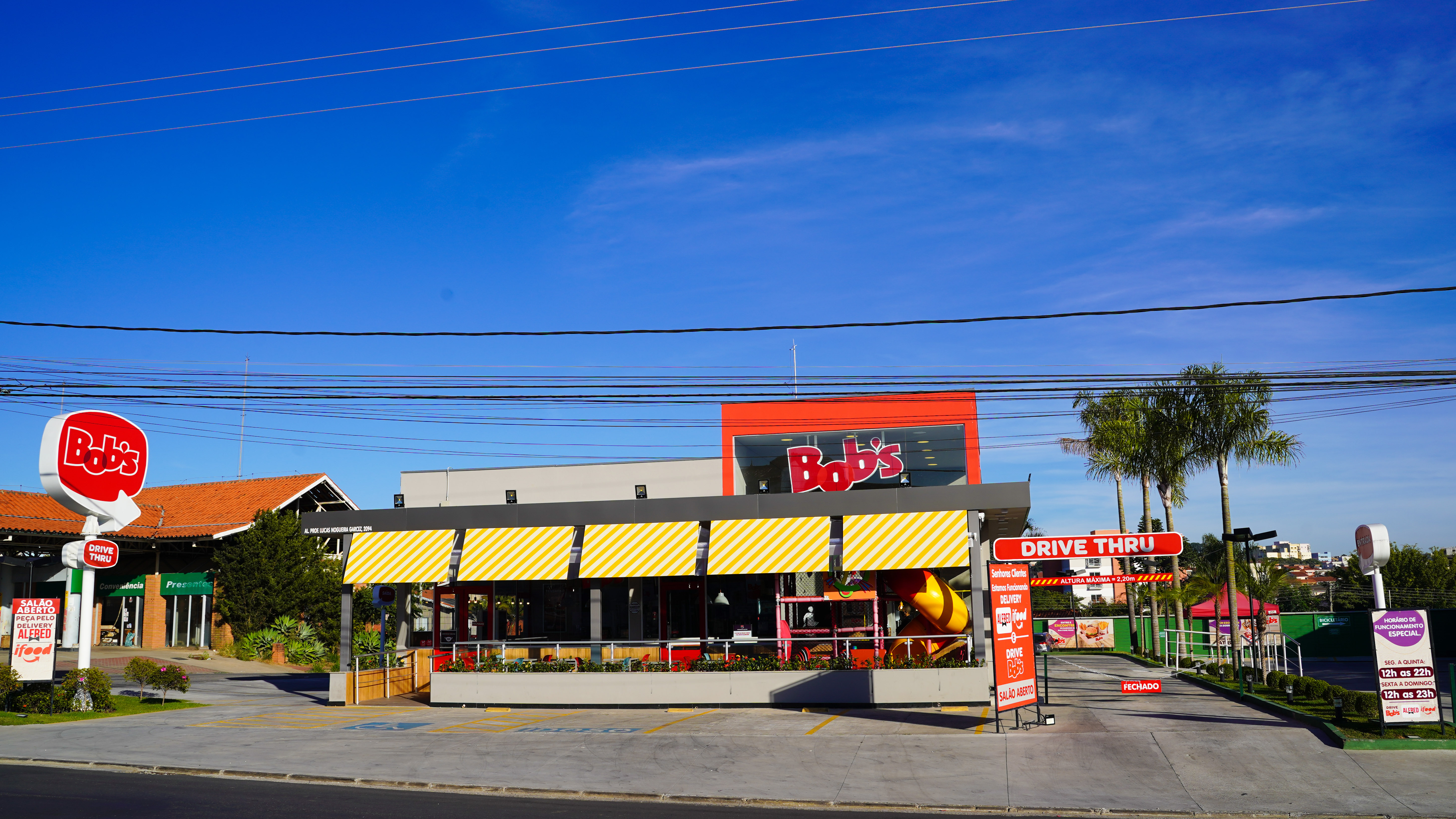 Um restaurante localizado em Atibaia, interior de São Paulo.